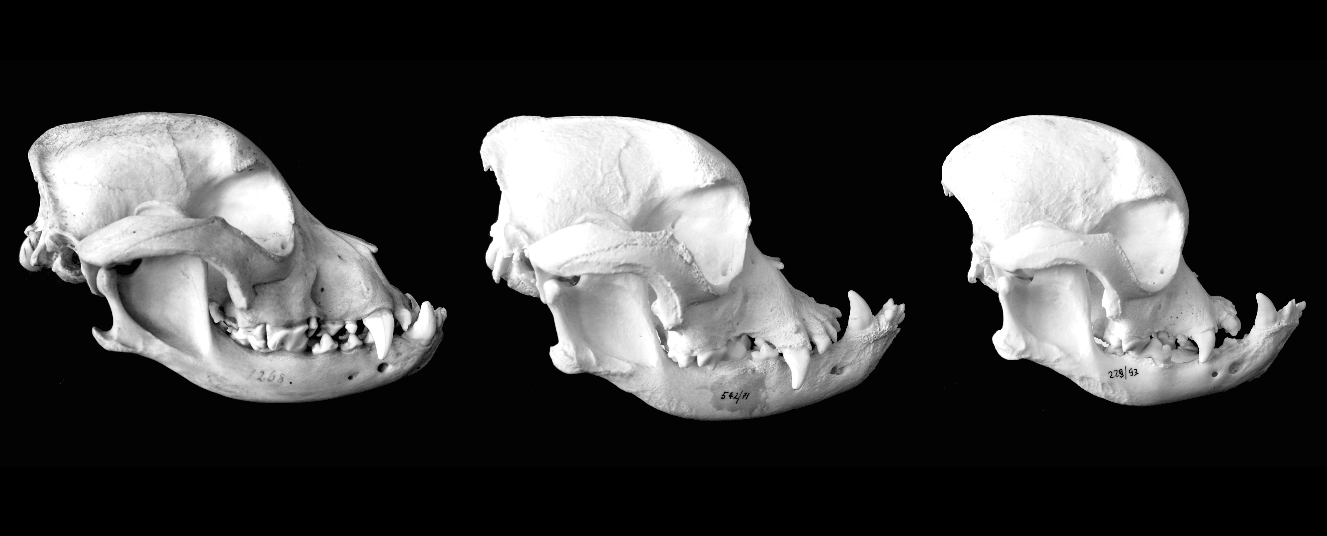 Entwicklung der Schädel von Englischen Bulldoggen